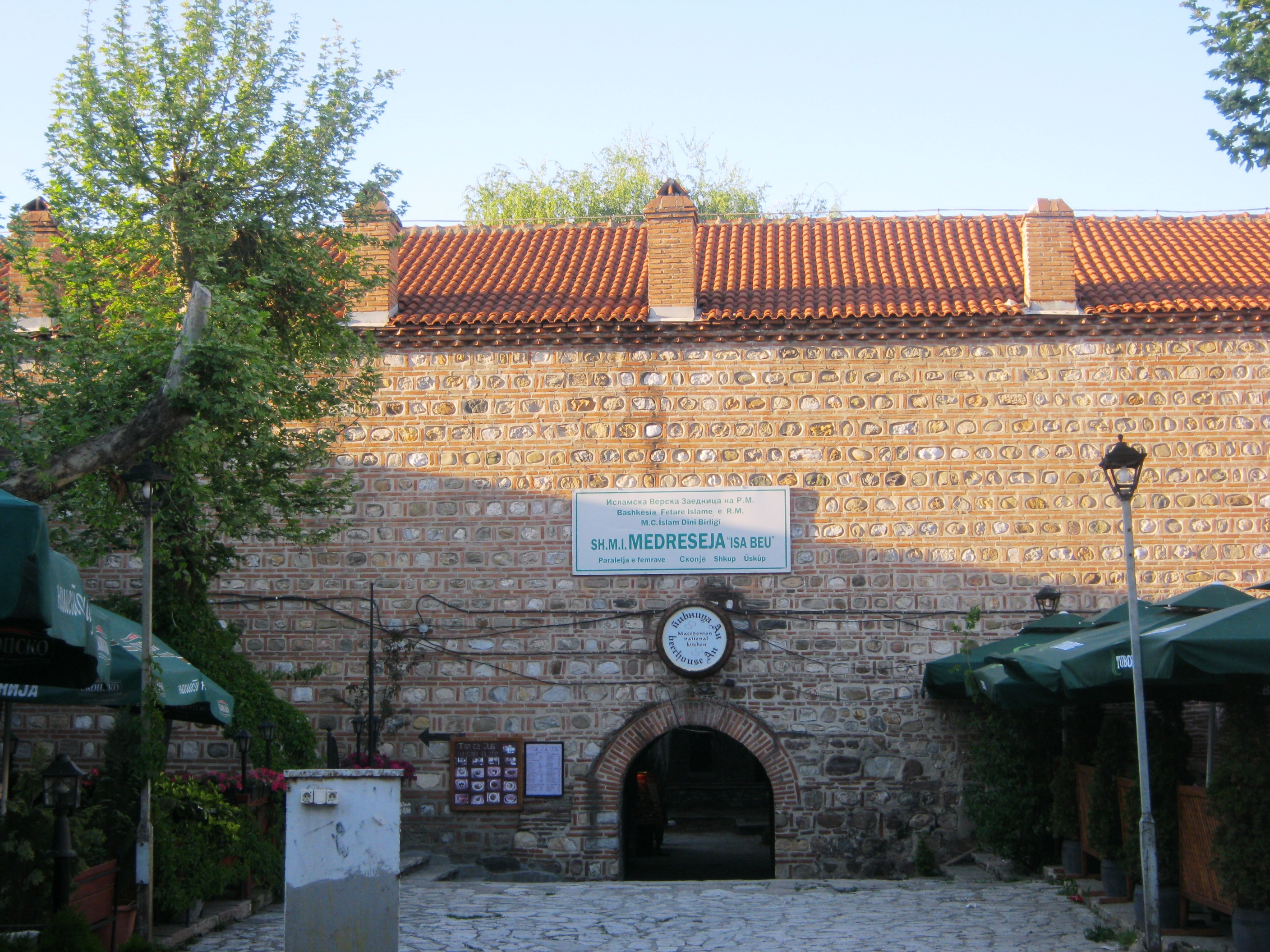 Капан ан